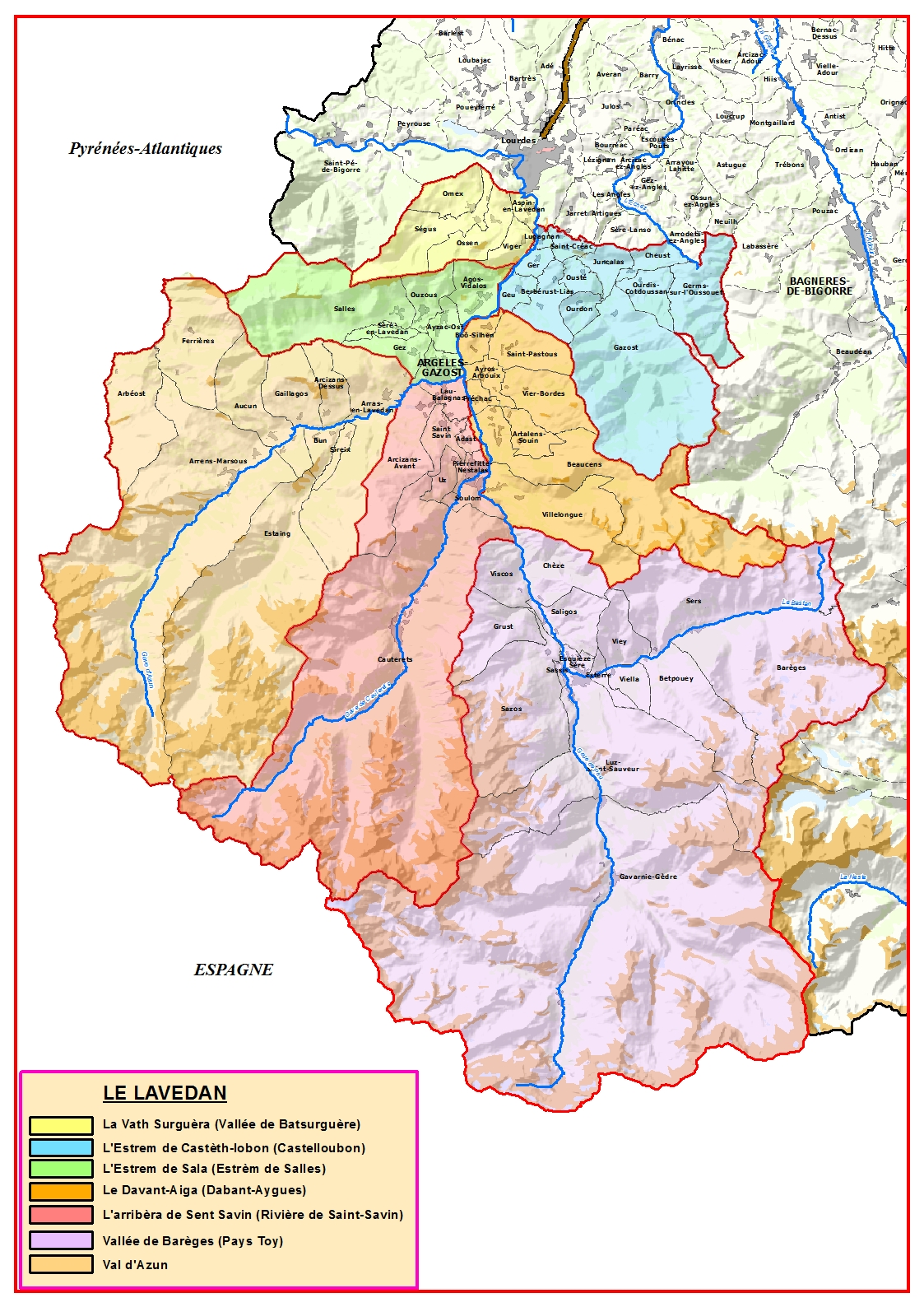 Carte du Lavedan (Hautes-Pyrénées)